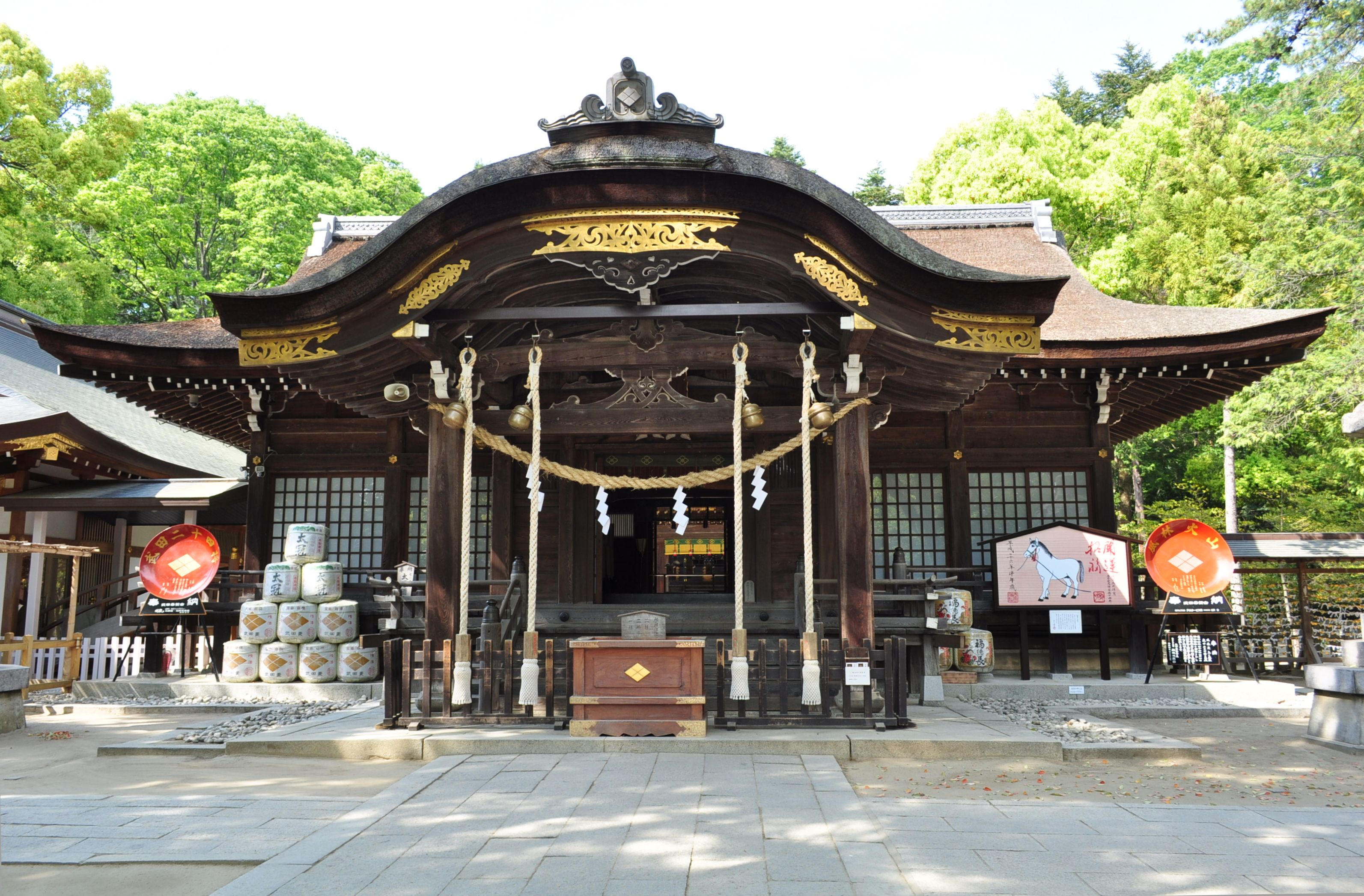 2014年（平成26年）5月8日、拝殿